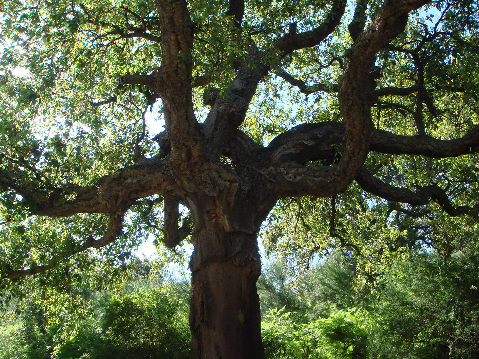 Quercus suber, Ceuta, España